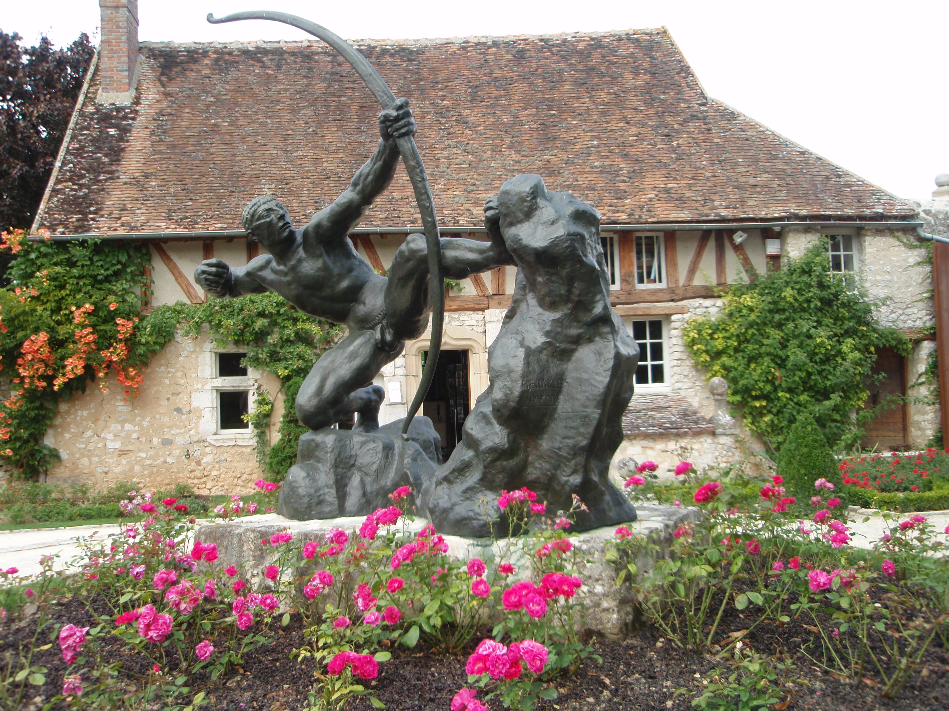 Héraklès archer Jardin-musée Egreville Paris France